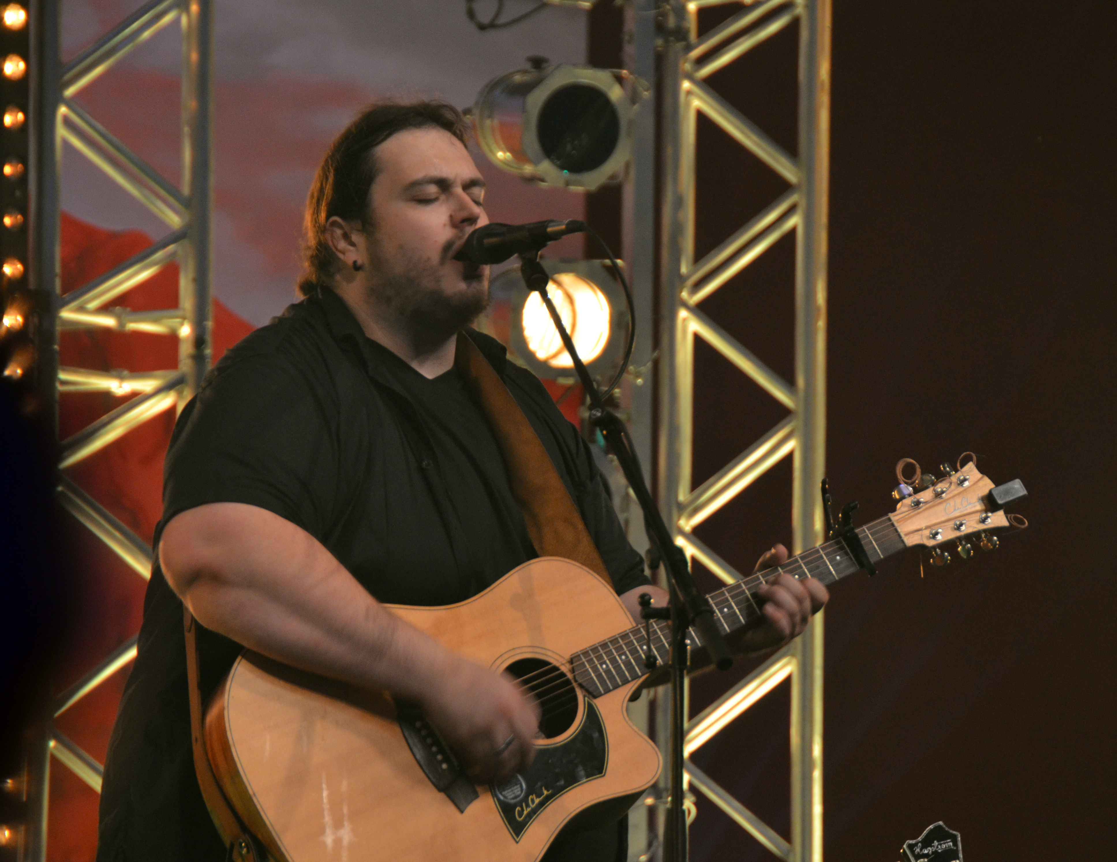 Heimatsound-Festival 2014, Mathias Kellner Festivalsommer This photo was created with the support of donations to Wikimedia Deutschland in the context of the CPB project "Festival Summer". This file is made available under the Creative Commons CC0 1.0 Universal Public Domain Dedication. The person who associated a work with this deed has dedicated the work to the public domain by waiving all of their rights to the work worldwide under copyright law, including all related and neighboring rights, to the extent allowed by law. You can copy, modify, distribute and perform the work, even for commercial purposes, all without asking permission. Personality rights warningAlthough this work is freely licensed or in the public domain, the person(s) shown may have rights that legally restrict certain re-uses unless those depicted consent to such uses. In these cases, a model release or other evidence of consent could protect you from infringement claims.